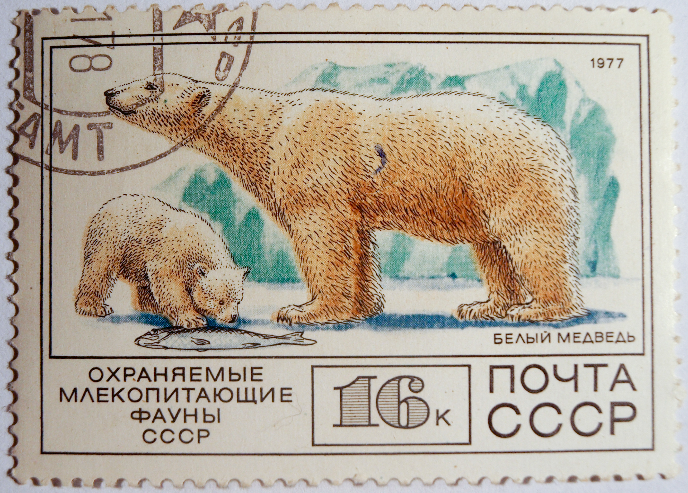 автор почтовой марки В. Колганов - технология печати почтовой марки глубокая в сочетании с металлографией - бумага почтовой марки мелованная - зубцовка почтовой марки рамочная 11,5:12 - цвет почтовой марки многоцветная - водяные знаки нет данных